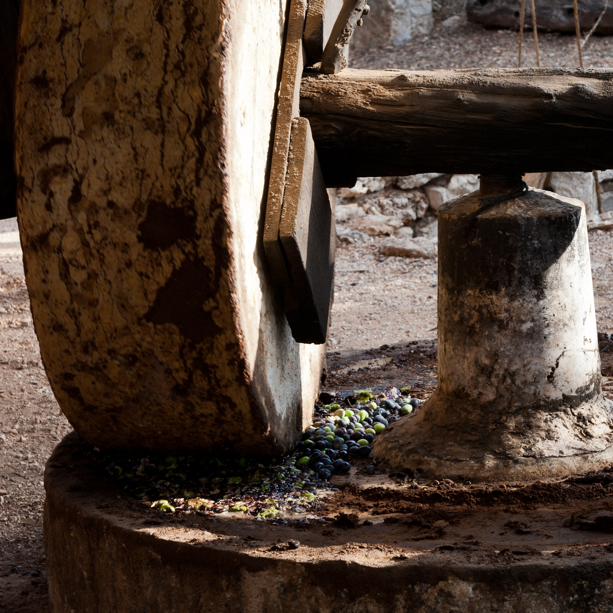 פעילות יצהר בכפר קדם